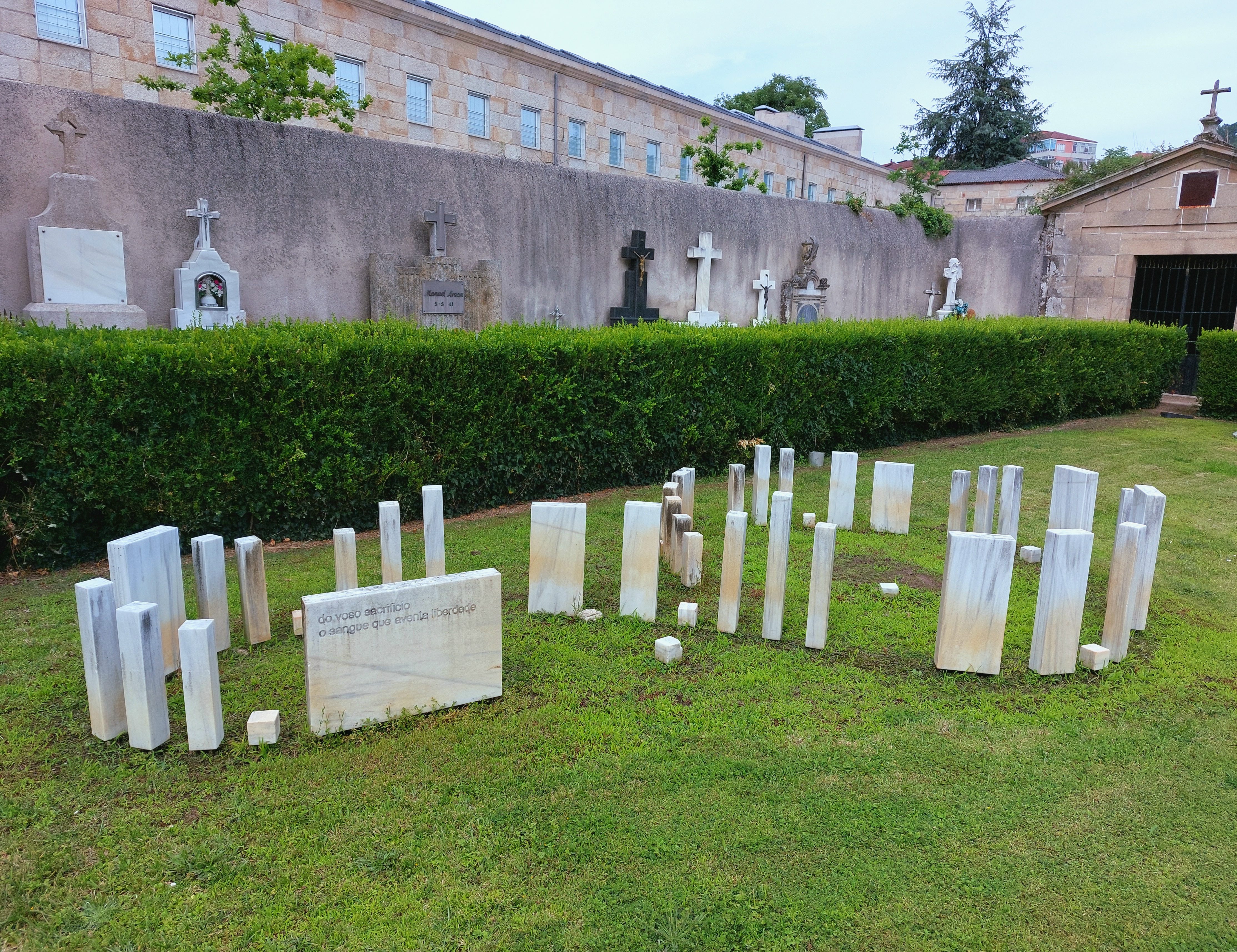 Memorial víctimas franquismo (Ourense)